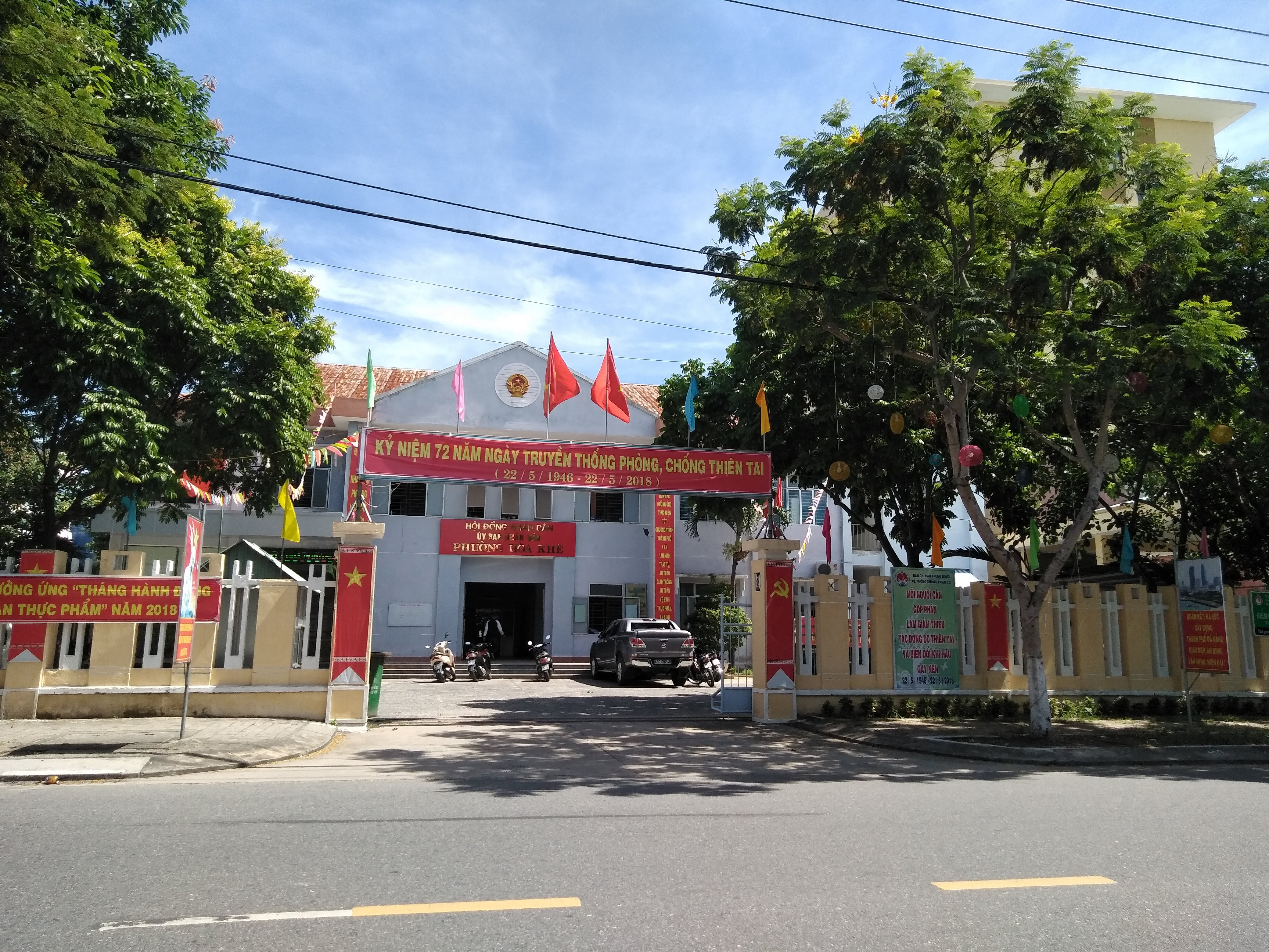 UBND phường Hòa Khê, Thanh Khê, Đà Nẵng